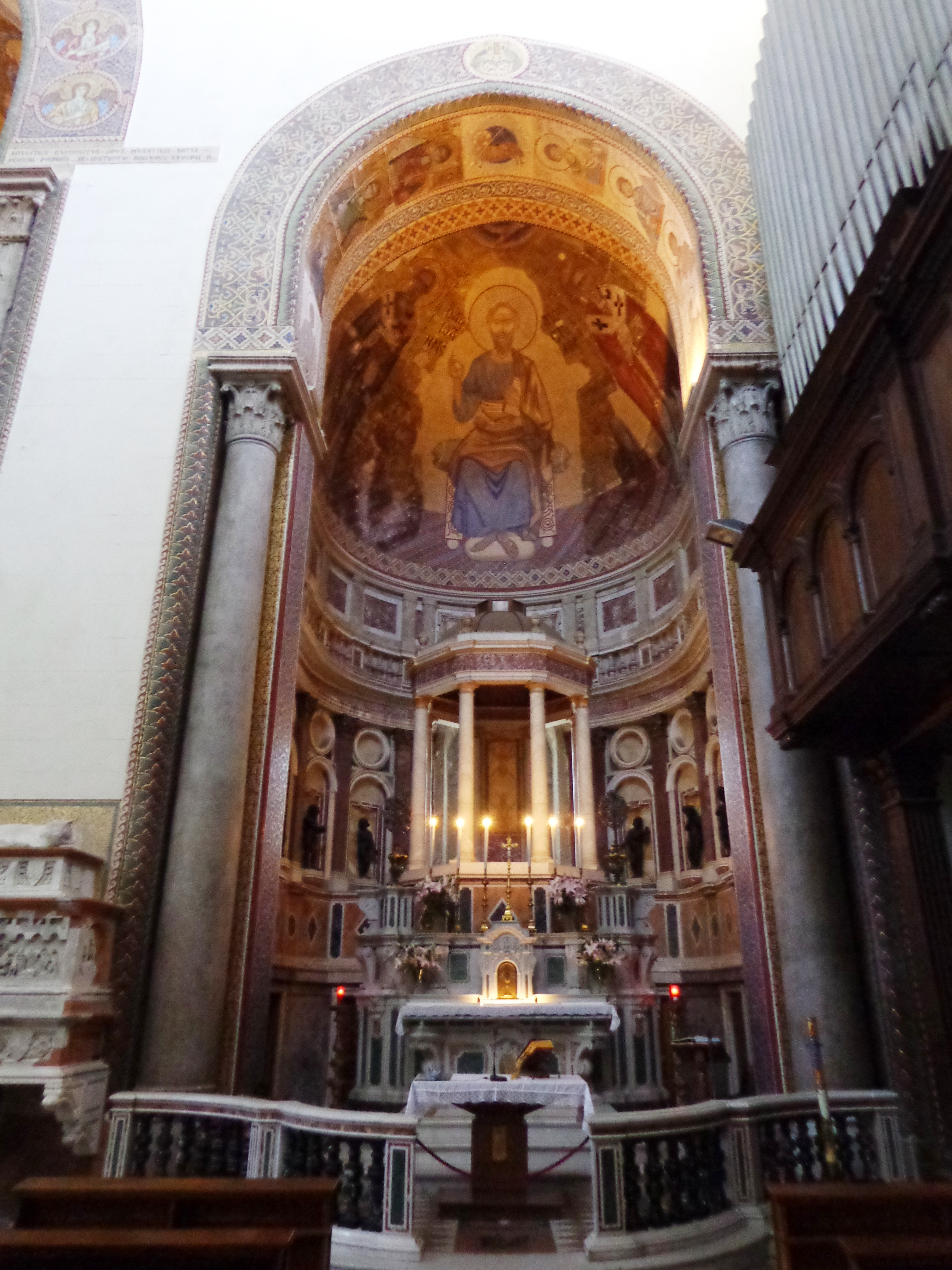 Duomo_ME_3